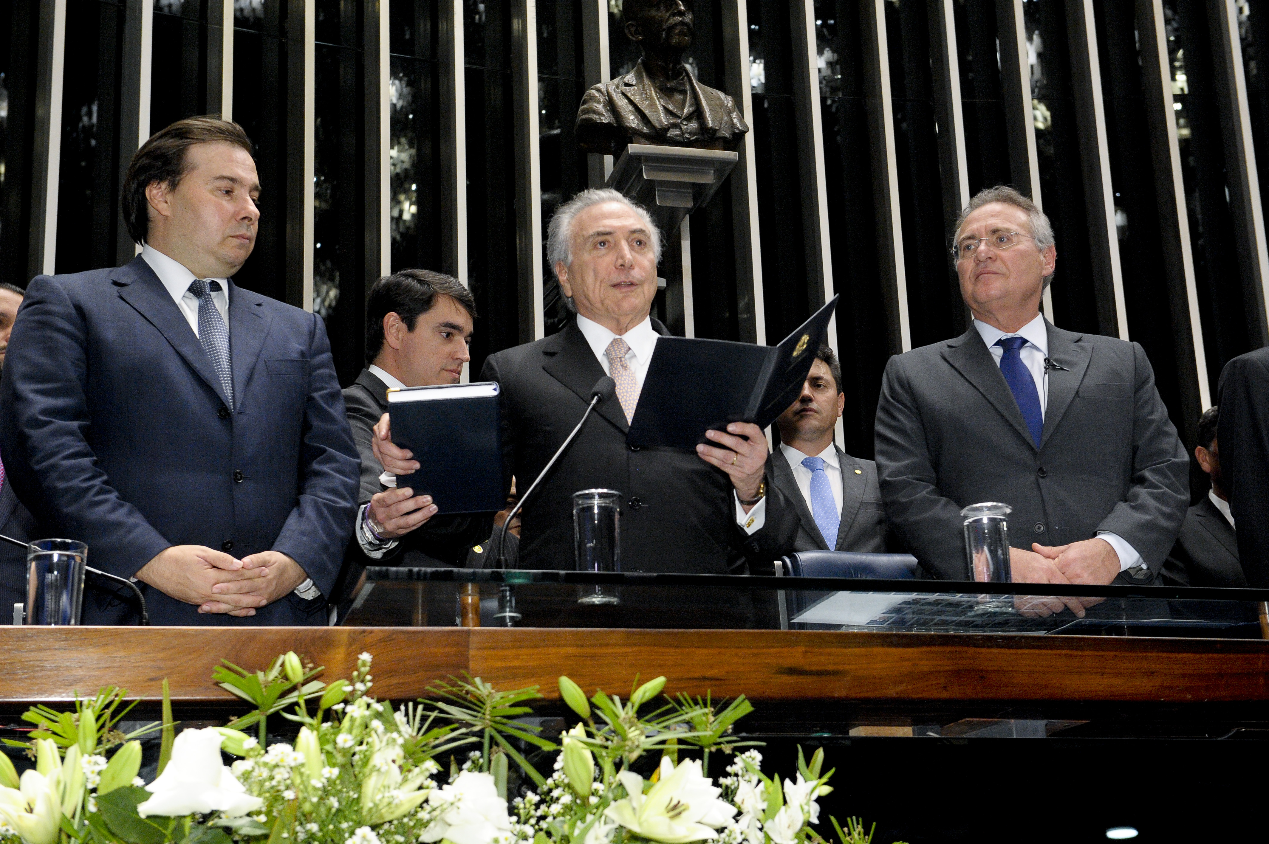 Plenário do Senado durante sessão solene do Congresso Nacional destinada à posse do Excelentíssimo Senhor Michel Temer como Presidente da República. Mesa: presidente da Câmara dos Deputados, deputado Rodrigo Maia (DEM-RJ); presidente da República Michel Temer; presidente do Senado, senador Renan Calheiros (PMDB-AL) Foto: Waldemir Barreto/Agência Senado